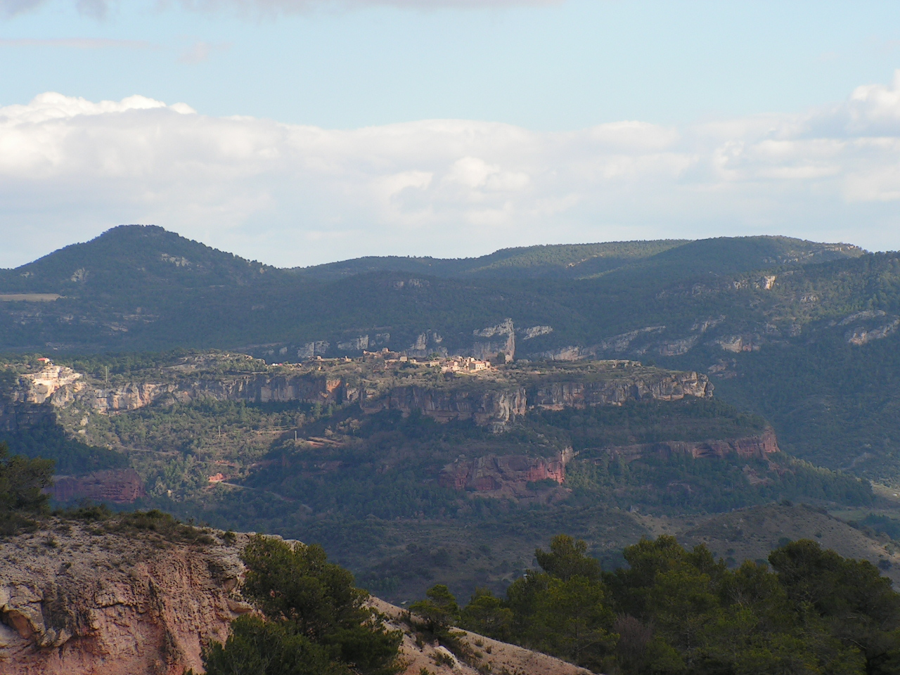 Siurana de Prades This is a a photo of a geologic site or geotope in Catalonia, Spain, with id: IEIGC-305